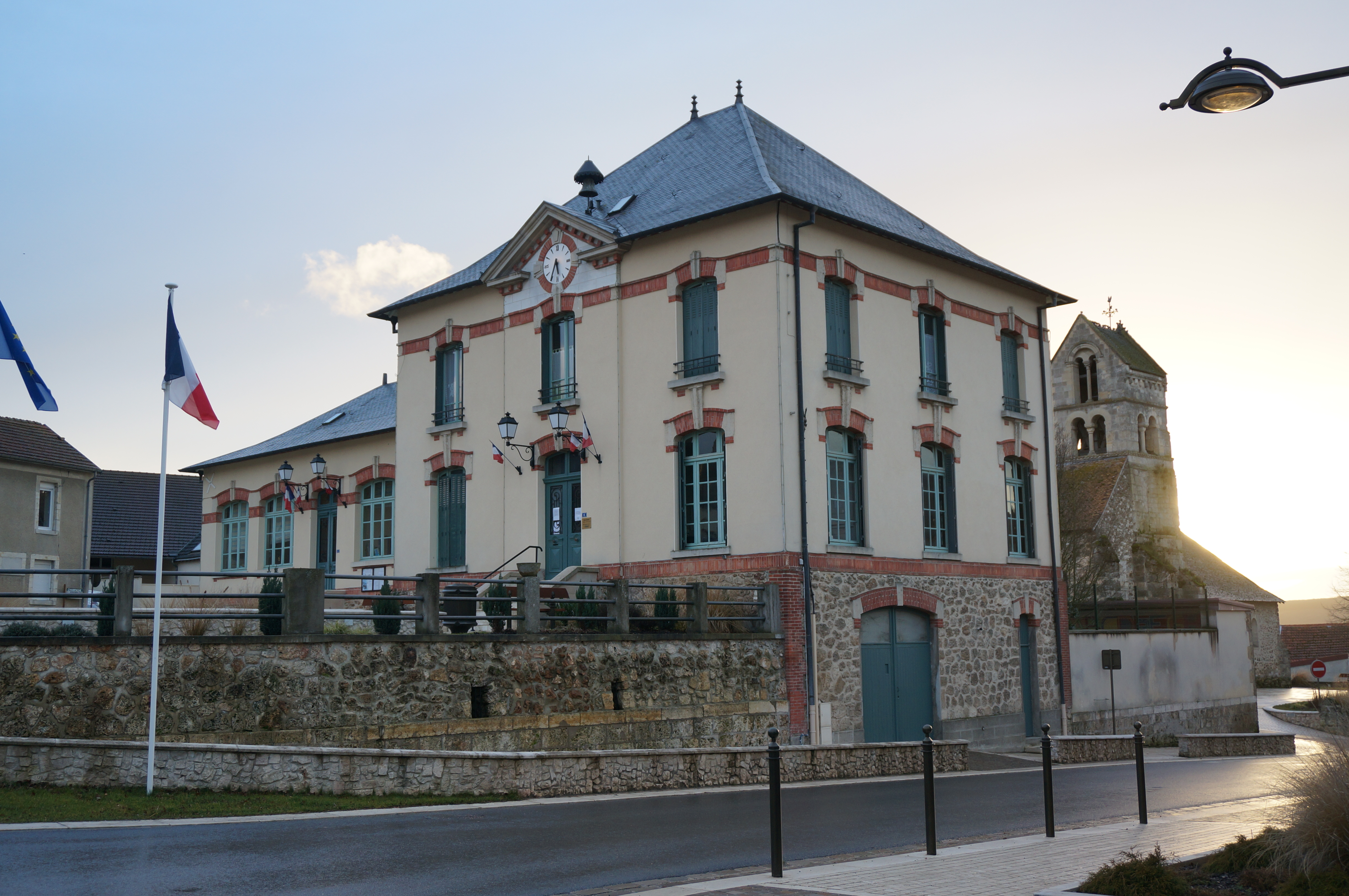 vue de la Mairie et de l'église.